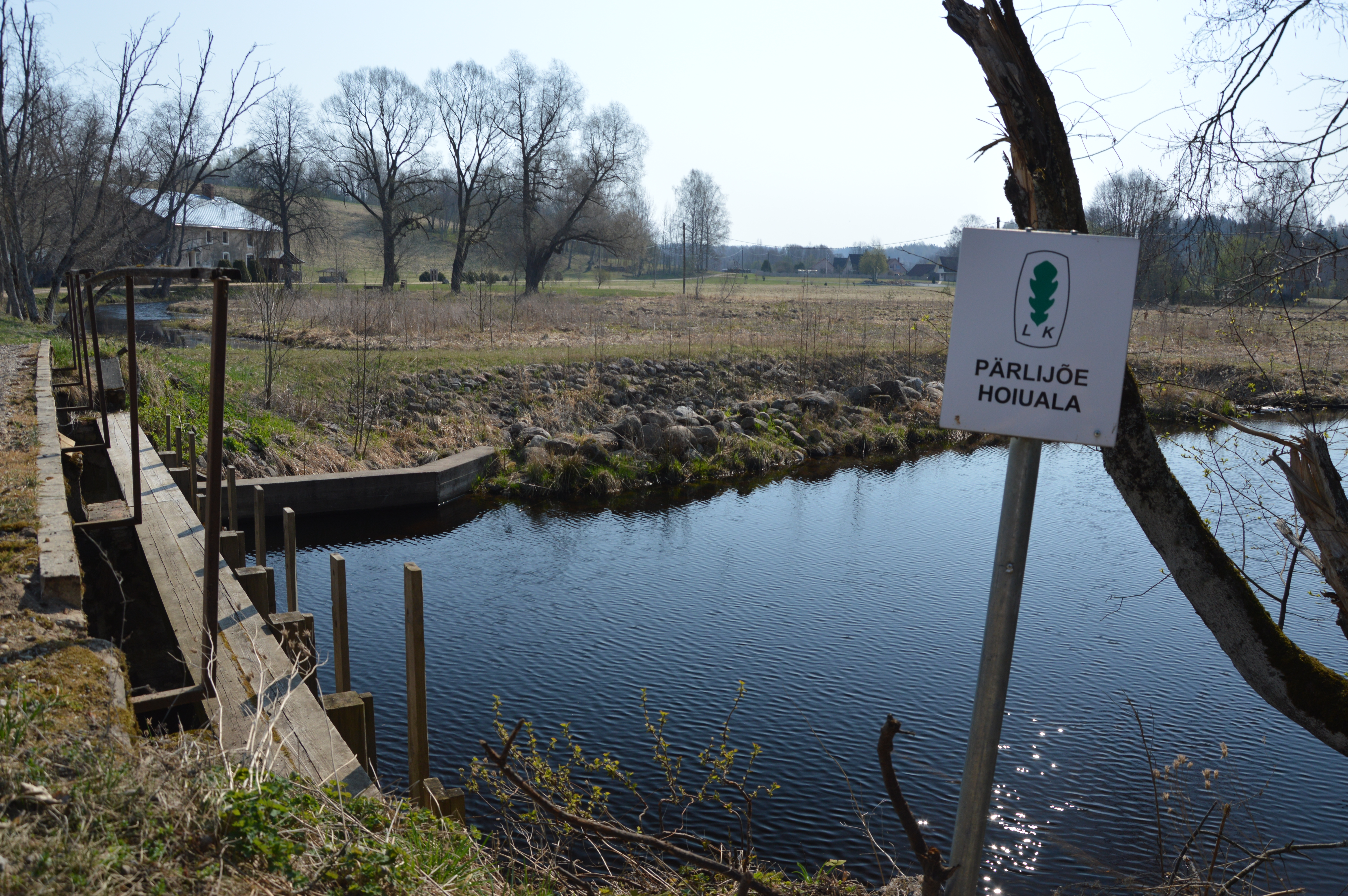 Pärlijõgi ja Sänna mäeveski